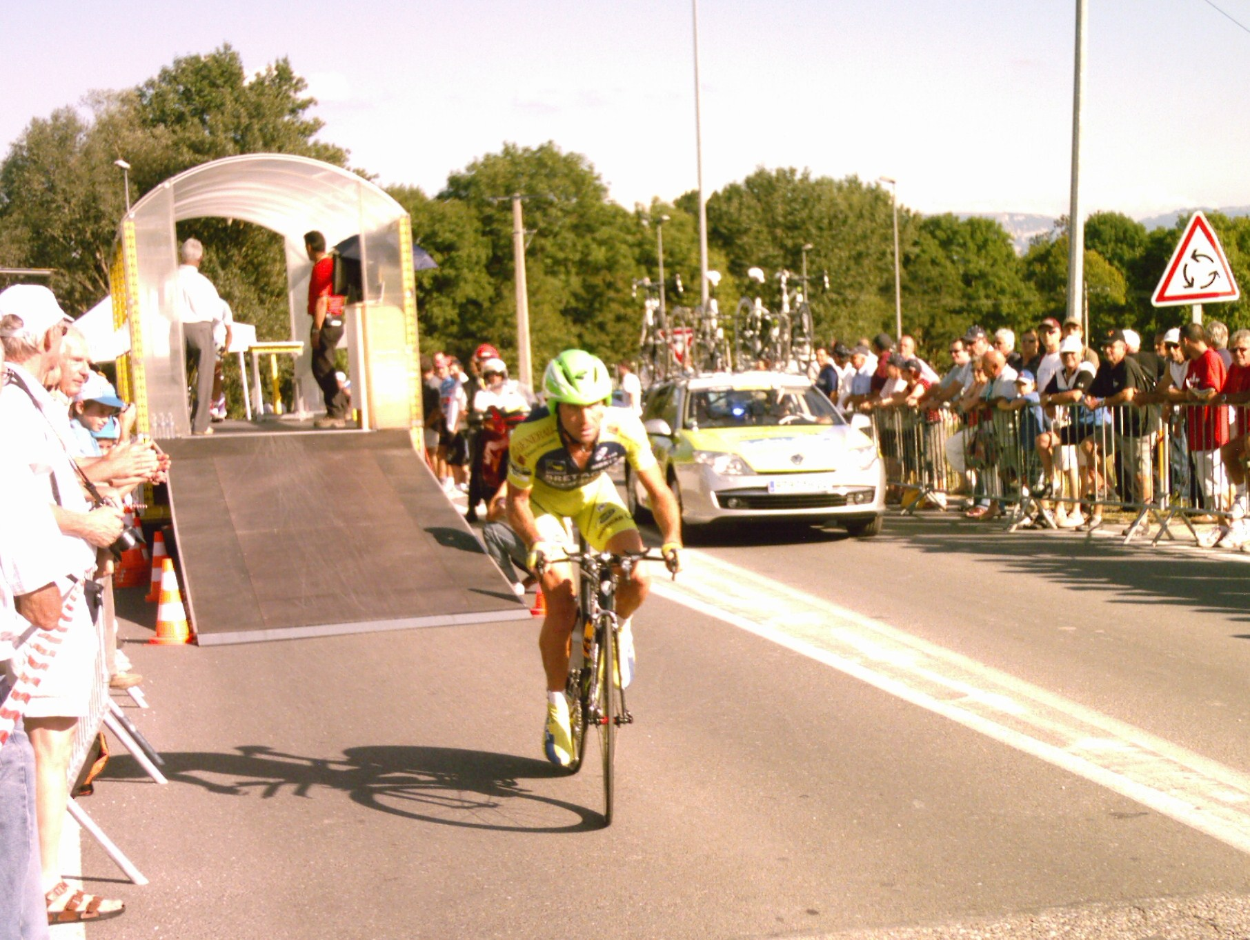 Noan Lelarge au départ du contre-la-montre de la troisième étape b du Tour de l'Ain 2009.